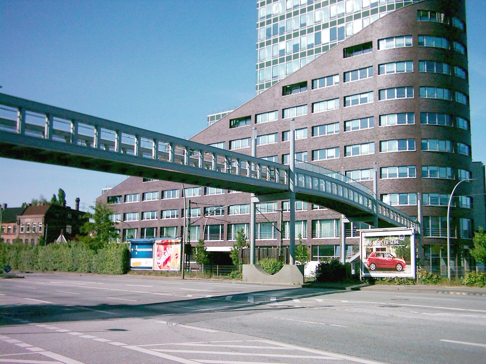 Fußgängerbrücke über die B73 in Hamburg-Harburg. im Hintergrund der Channel-Tower.